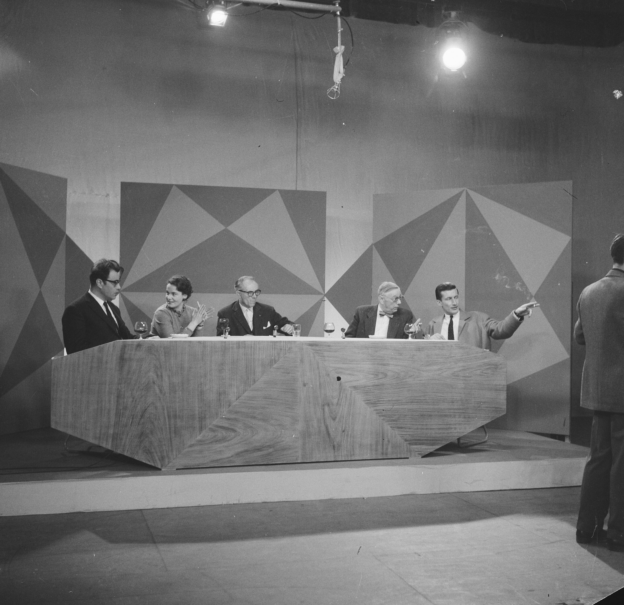 Collectie / Archief : Fotocollectie Anefo Reportage / Serie : [ onbekend ] Beschrijving : Televisieuitzending "Hou je aan je woord", v.l.n.r. Godfried Bomans, H. Haase, K. Jonkheer, V.E. van Vriesland en H. Mulisch Datum : 19 februari 1961 Trefwoorden : Televisieuitzendingen Persoonsnaam : Bomans, Godfried, Haase, Hella, Jonkheer, K., Mulisch, Harry, Vriesland, Victor van Fotograaf : Rossem, Wim van / Anefo Auteursrechthebbende : Nationaal Archief Materiaalsoort : Negatief (zwart/wit) Nummer archiefinventaris : bekijk toegang 2.24.01.03 Bestanddeelnummer : 912-1121